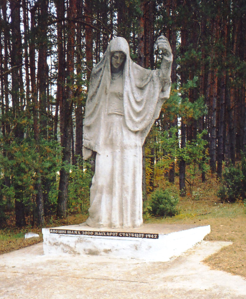 Мемориал на братской могиле евреев города Столбцы Минской области, убитых нацистами во время Холокоста.